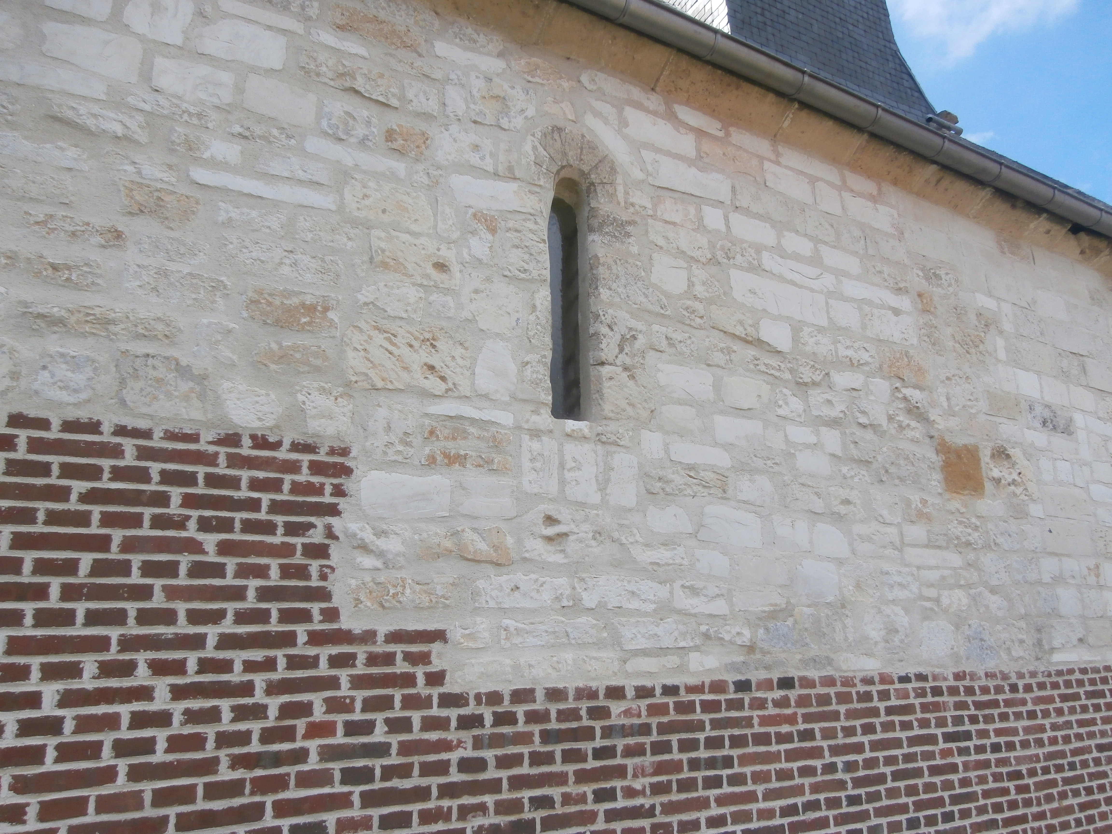 Fenêtre romane du XIIe siècle entourée d'un arc dentelé, coté nord de l'église Saint-Aubin de Saint-Aubin-sous-Erquery (60).